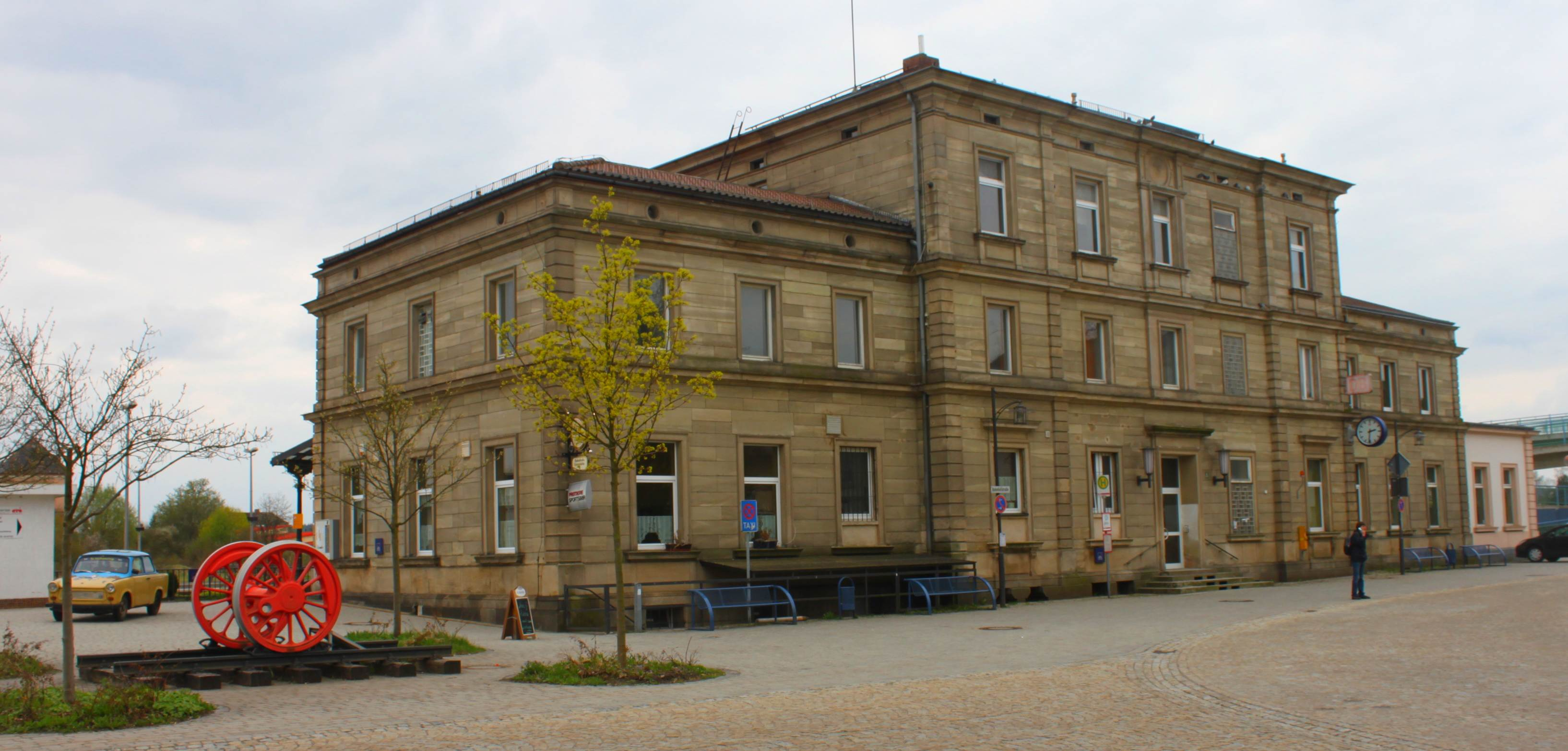 Das alte Bahnhofsgebäude in Speichersdorf wurde zwischen 1898 und 1902 errichtet und für die damalige Zeit fürstlich ausgestattet